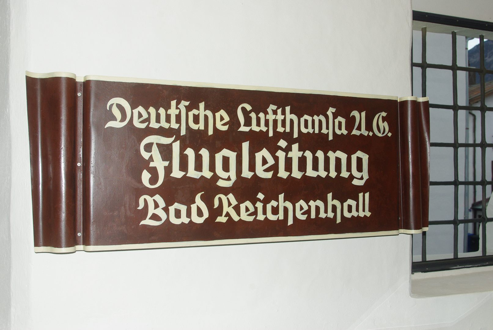 Tafel Lufthansa im Heimatmuseum in Bad Reichenhall